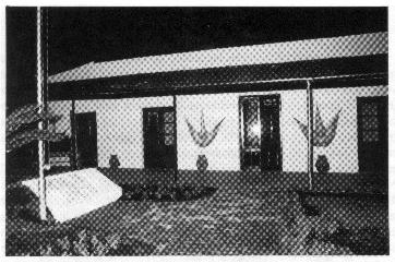 Museo Regional Brigadier Gral J. M. de Rosas, San Andrés, Buenos Aires, Argentina.